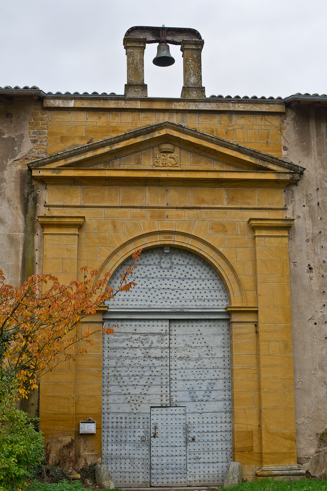 Château d'Avauges, (InscritInscrit, 19812010) .